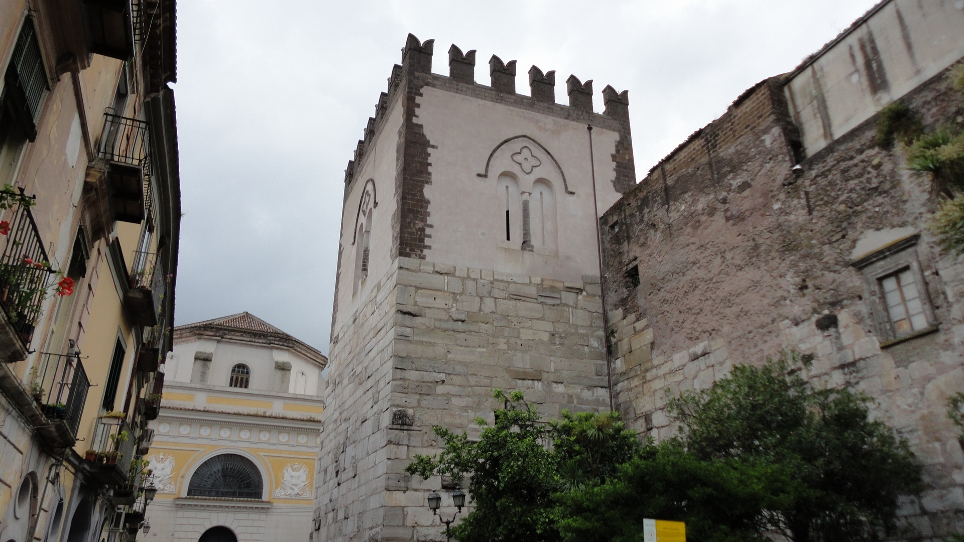 Fondato fuori dalle mura,il "Castrum Lapidum" (Castello delle Pietre) fu inglobato nel circuito difensivo in età normanna. Più volte rimaneggiato, restano oggi i segmenti della cinta muraria, parte della fabbrica principale una torre quadrata a blocchi calcarei squadrati, provenienti dall'anfiteatro campano. © AD 2010 Agostino Pedata.